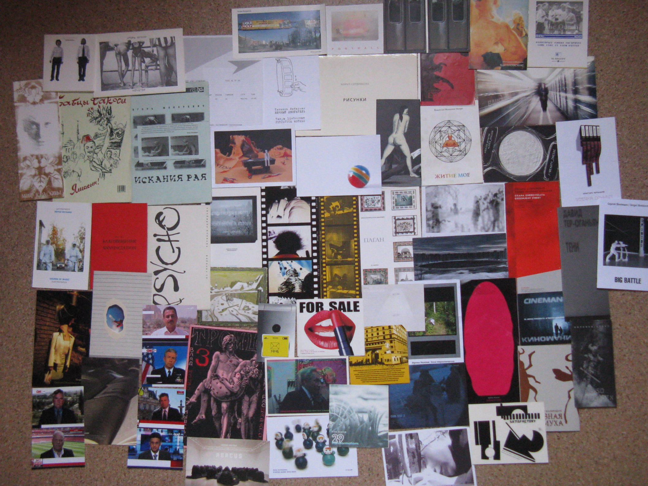 Моя коллекция каталогов XL-галереи. К сожалению, «Искания рая» Игоря Макаревича я много лет назад порезал, сделав из этого каталога оформление для одной из своих компакт-кассет. Остальные каталоги на фотографии целые.